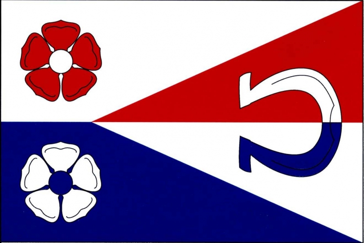 vlajka,Slapy , okres Tábor